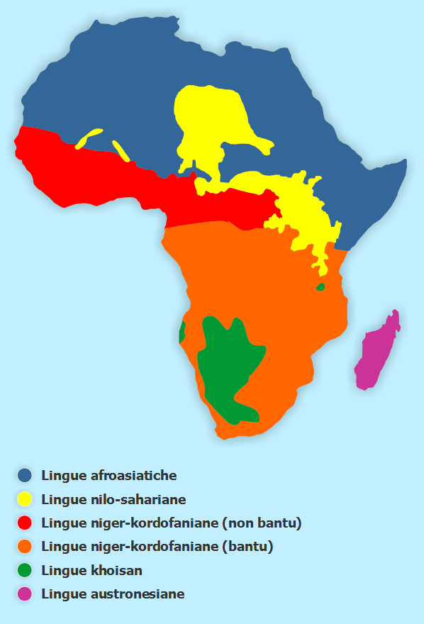 Famiglie linguistiche africane (italiano)